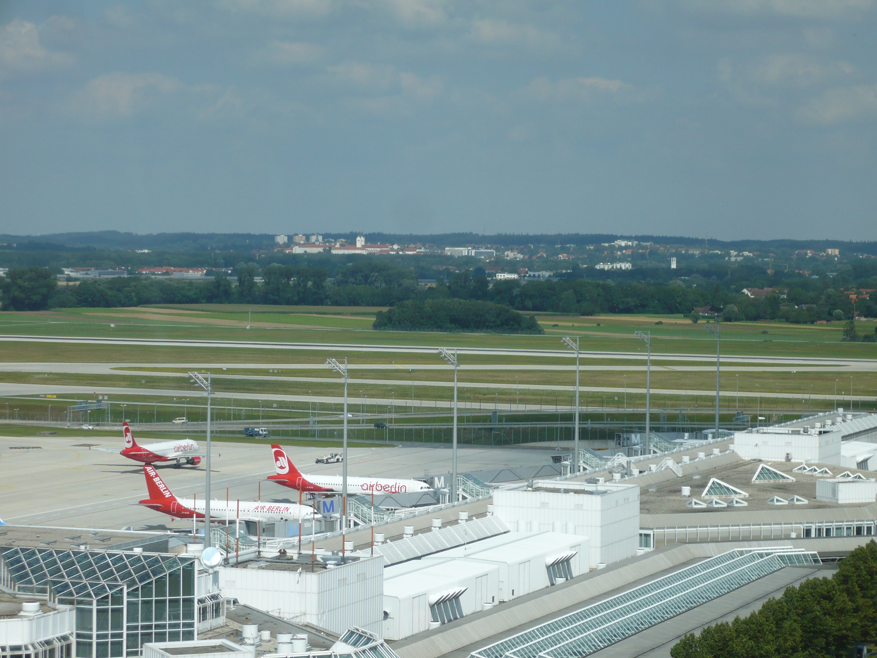 Flugzeuge der Air Berlin auf dem Vorfeld 1 des Flughafen München Franz Josef Strauß (Stadt Freising im Hintergrund)